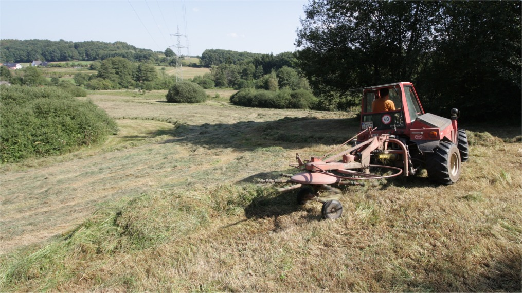 Mahd auf Bläulingsfläche